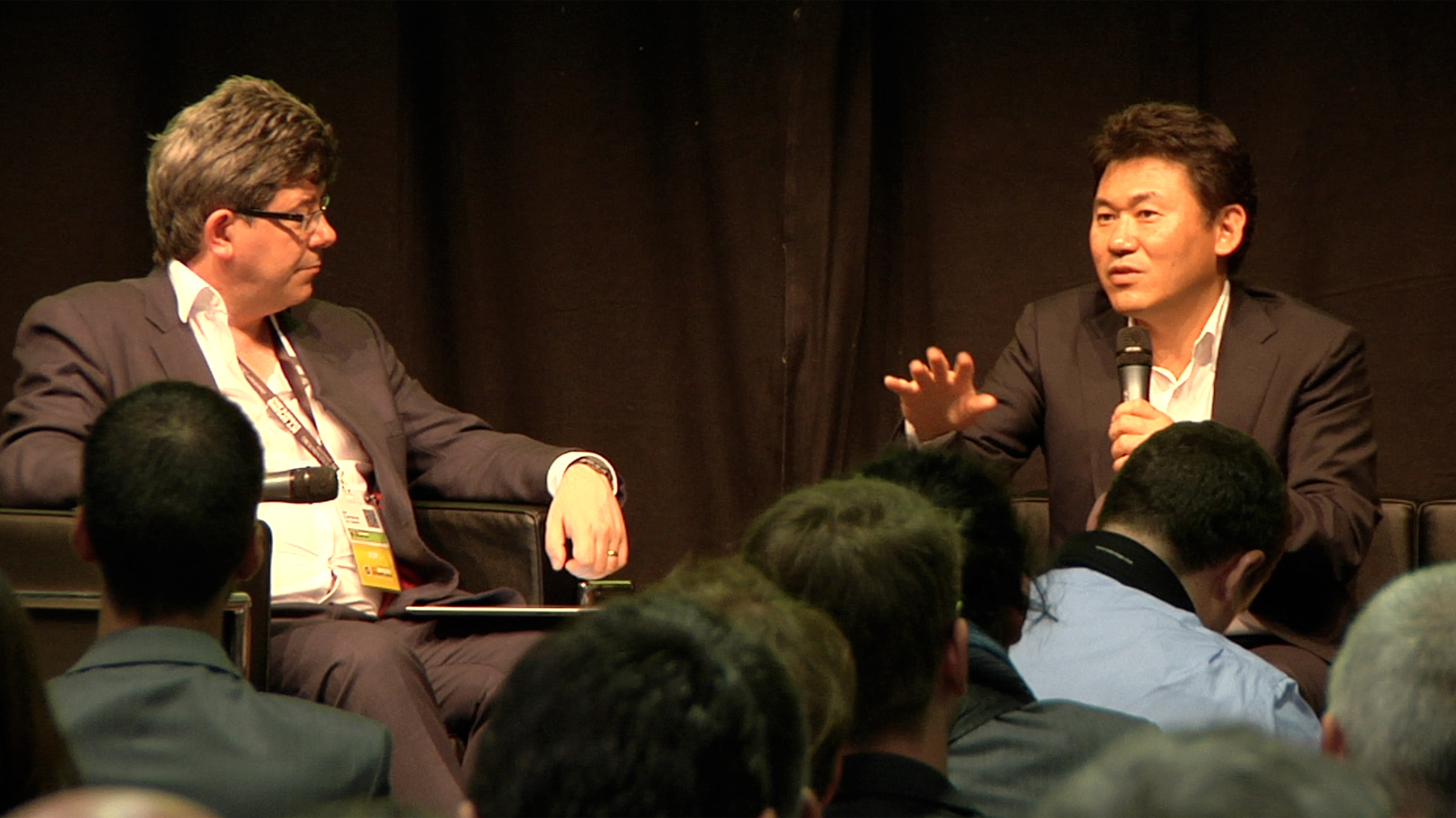 三木谷氏スピーチ